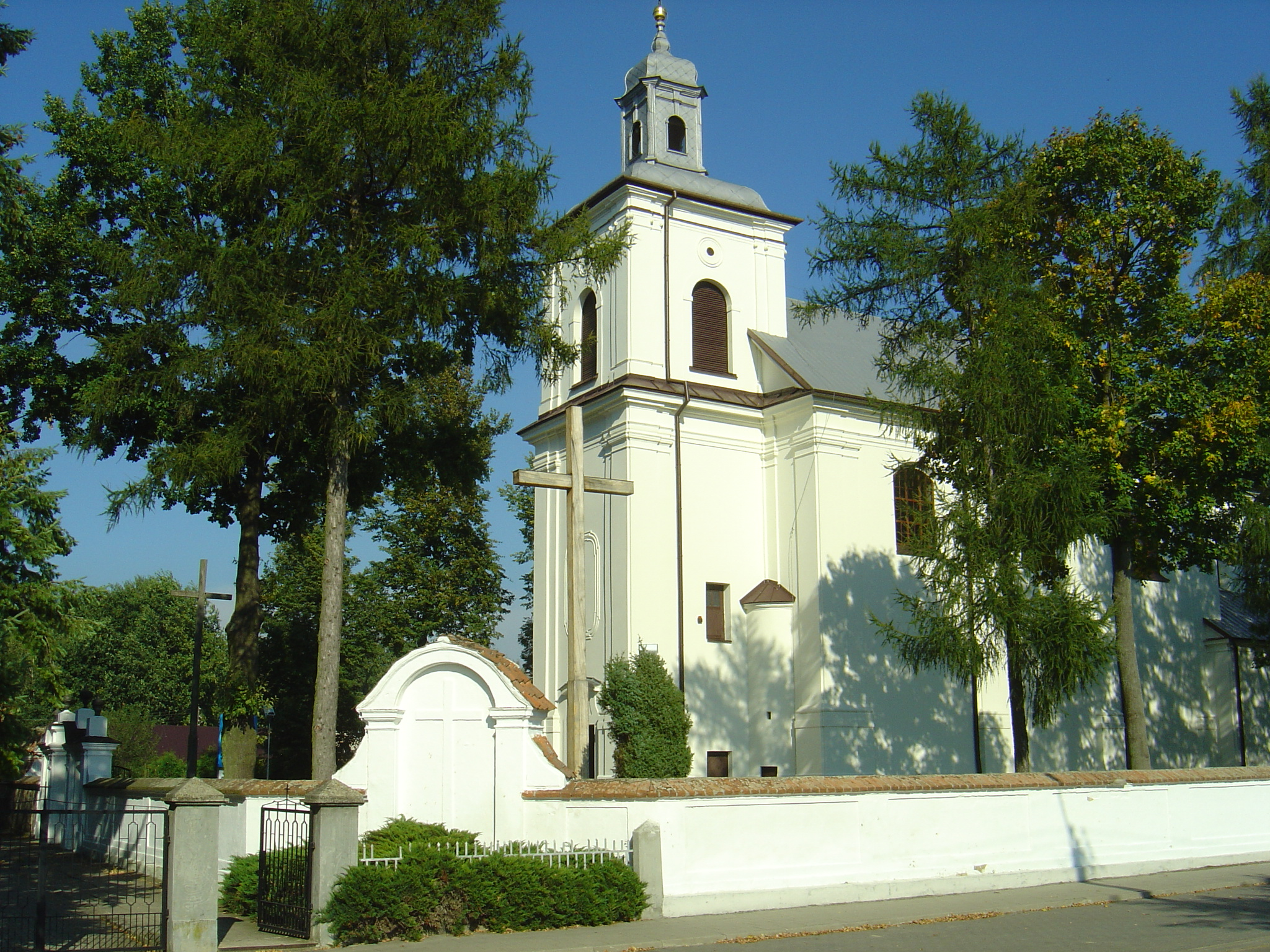 Rudka, ul. Ks. M. Badowskiego 1 - kościół parafialny pw. Św. Trójcy, mur., 1753-1759 (zabytek nr 235 z 25.10.1966)